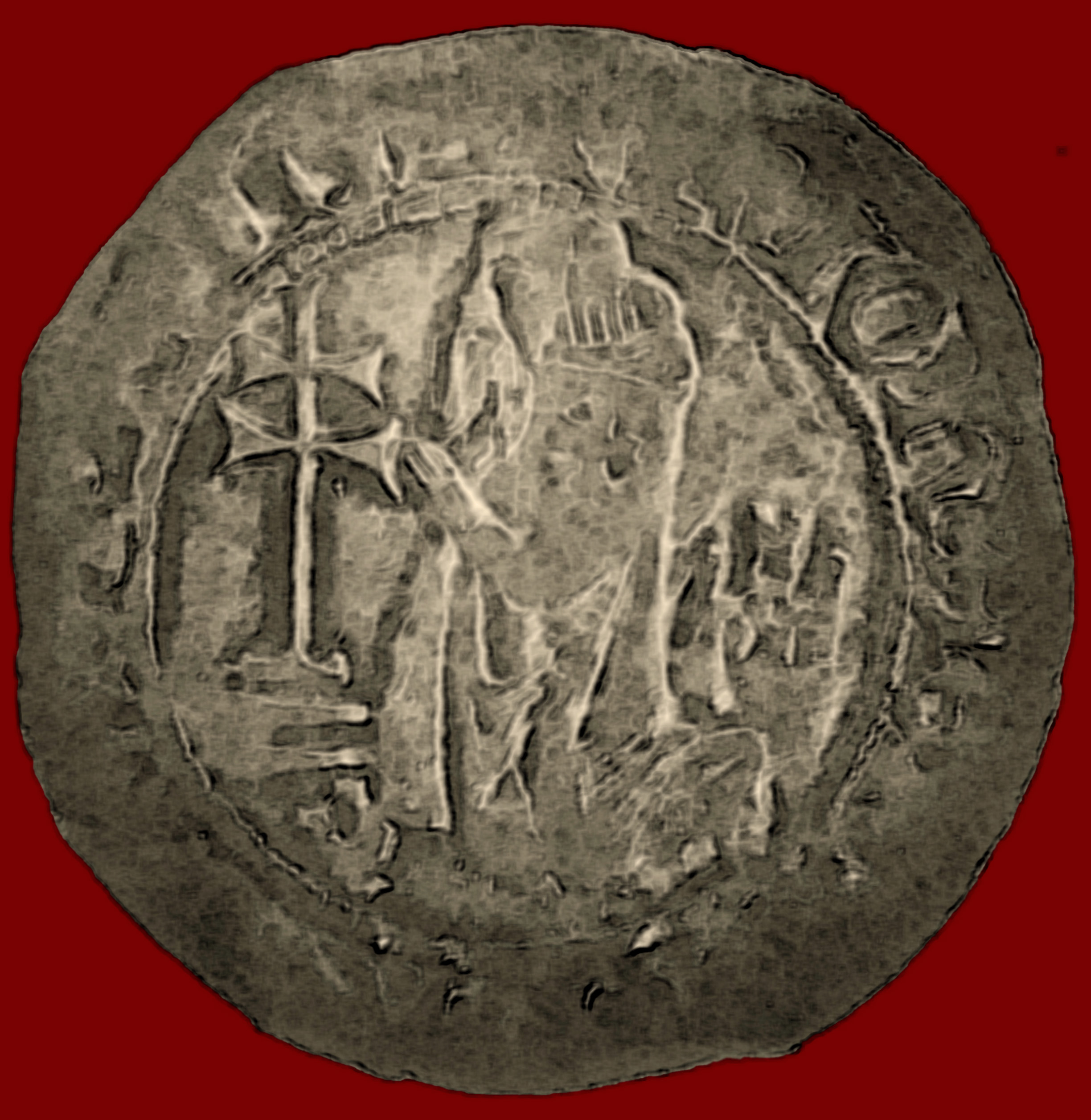 Gigliato de Juan Fernandez de Heredia entre 1377 et 1396, monnaie trouvée à Sorgues (Vaucluse)